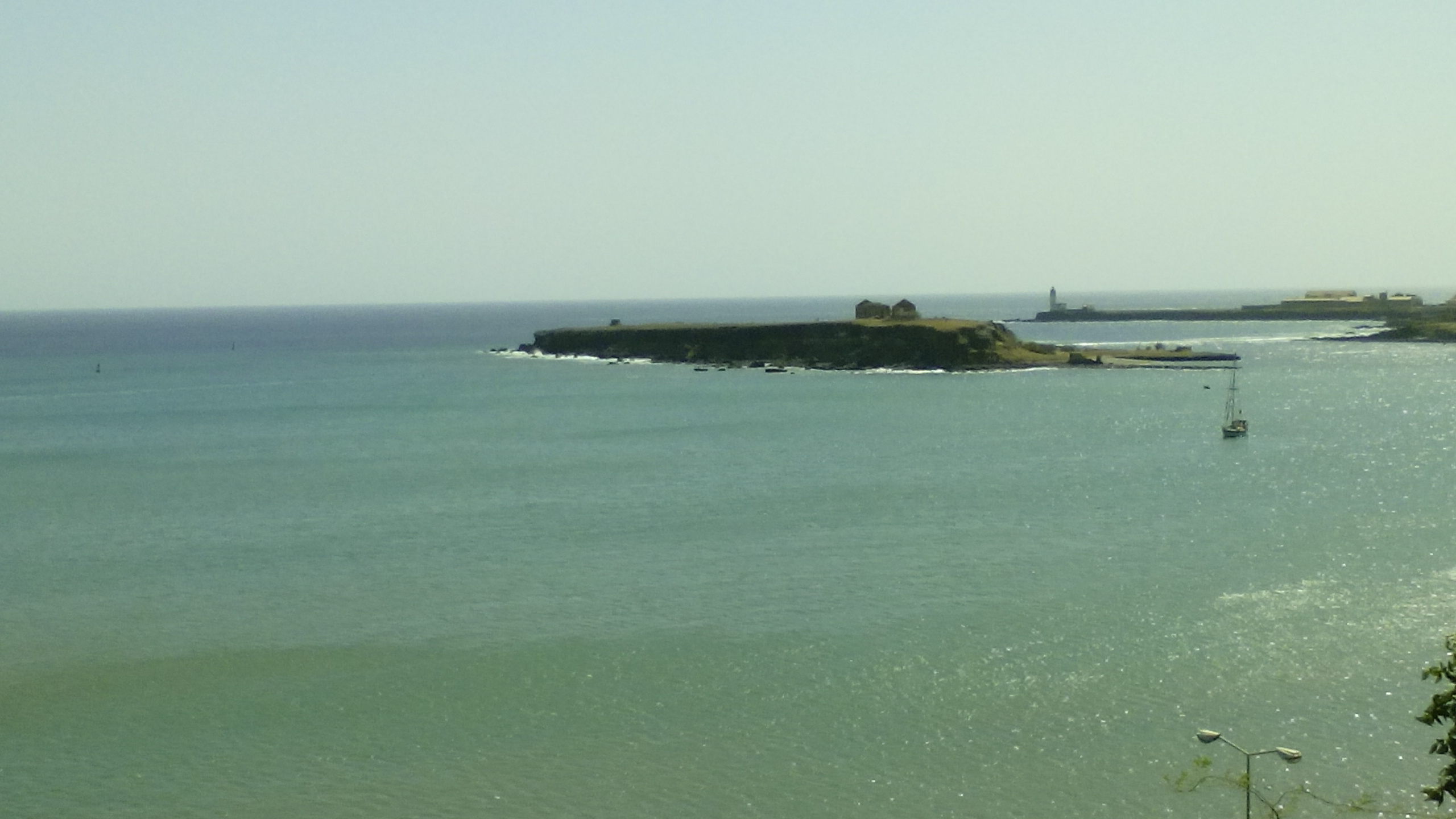 O ilheu de Santa Maria, perto da praia da Gamboa, Santiago, Cabo Verde.